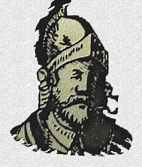 Książę pomorski Barnim I Dobry